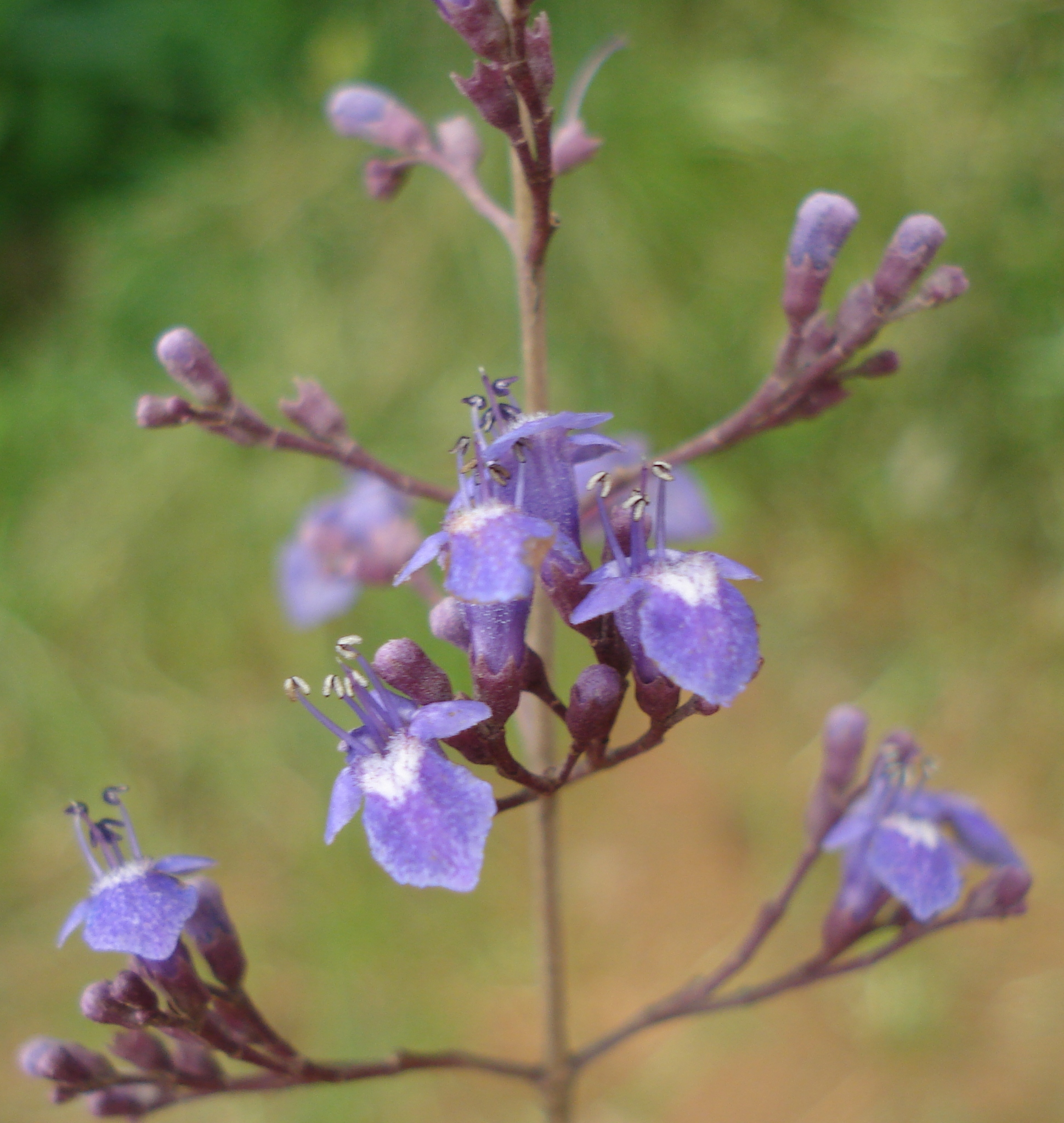 കരിനൊച്ചിയുടെ പൂക്കൾ